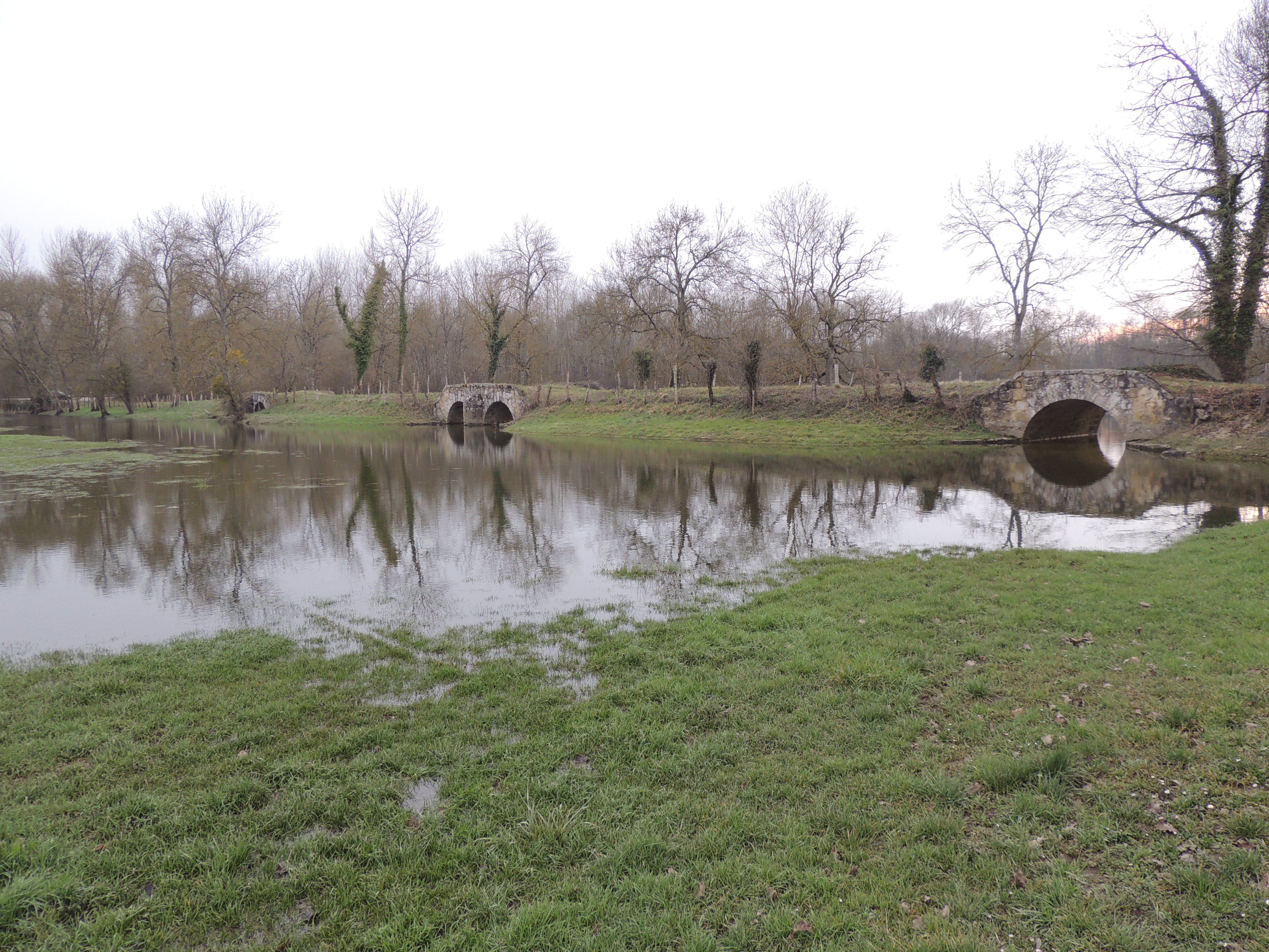 Ponts et chaussée surélevée du château de Jaillac, 4 ponts sur la photos alignés de la gauche (route Paris - Bâle) vers la droite (Nord de Nogent). La chaussée passant au dessus des ponts est bien surélevée et les ponts laissent passer les bras de seine sur les pâtures inondées en période d'hiver pour préserver Paris